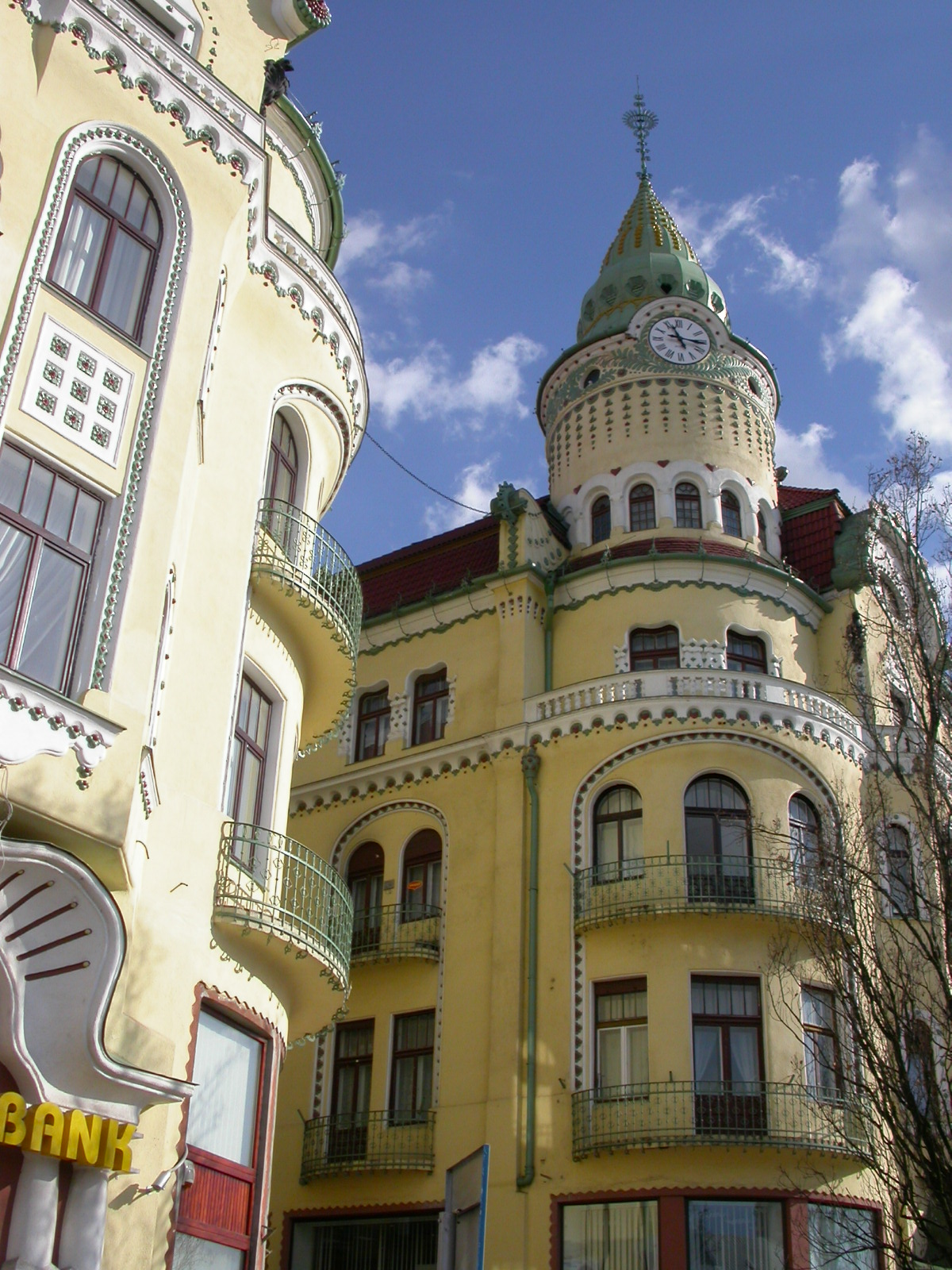 Palatul "Vulturul Negru" 1907-1908